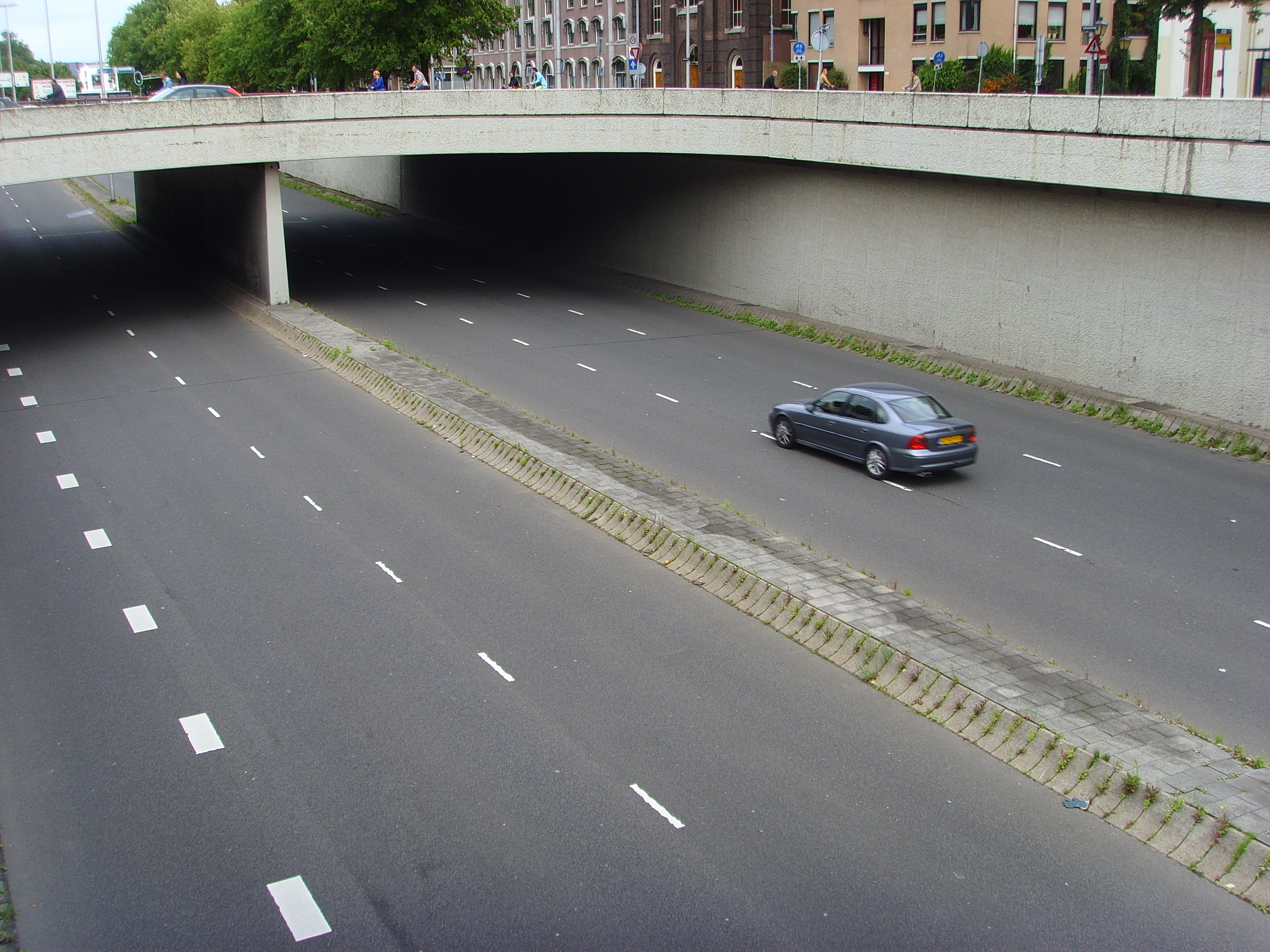 De Catharijnesingel in de binnenstad van Utrecht